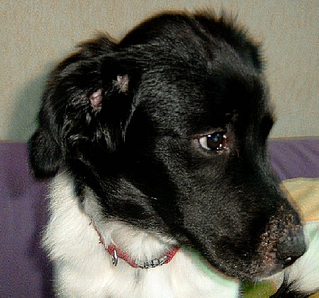 Hiske heeft Juvenile Cellulitis